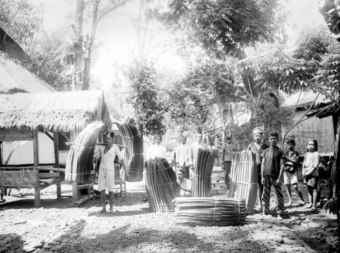 Negatief. In dessa Radjapolah in het district Tasikmalaja worden gesneden pandanbladeren klaar gemaakt voor transport, West-Java